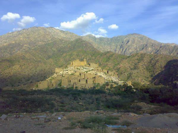 قرية ذي عين بلاد غامد الهيلا